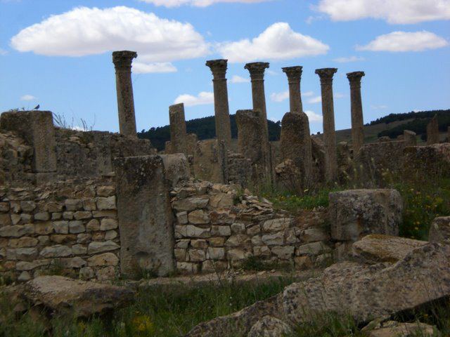 Ruines du site antique Madaure (Madaura, Madaurius, M'daourouch)